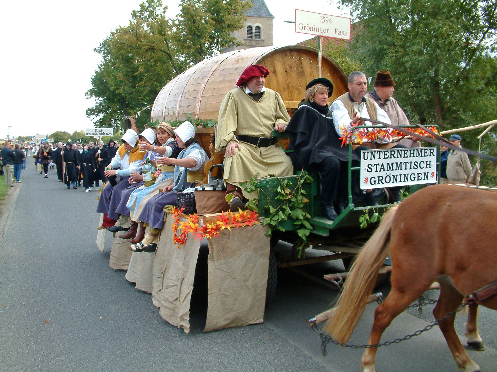 Gröninger Weinfass - Nachbildung für den Festumzug zur 1075-Jahrfeier der Stadt Gröningen.